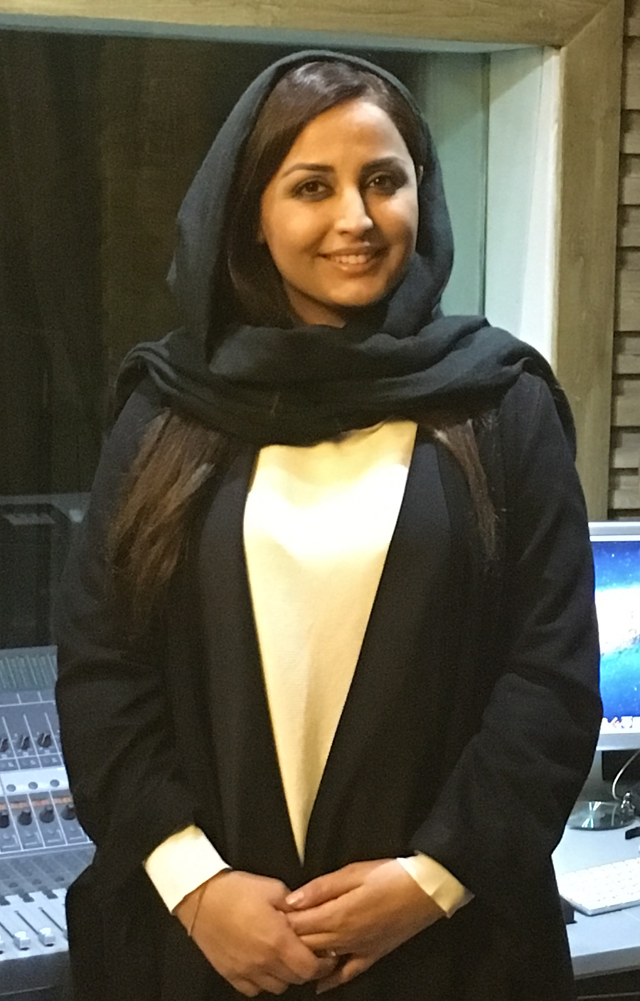 هیلا صدیقی - استودیو مدرن - ۷ آذر ۱۳۹۶